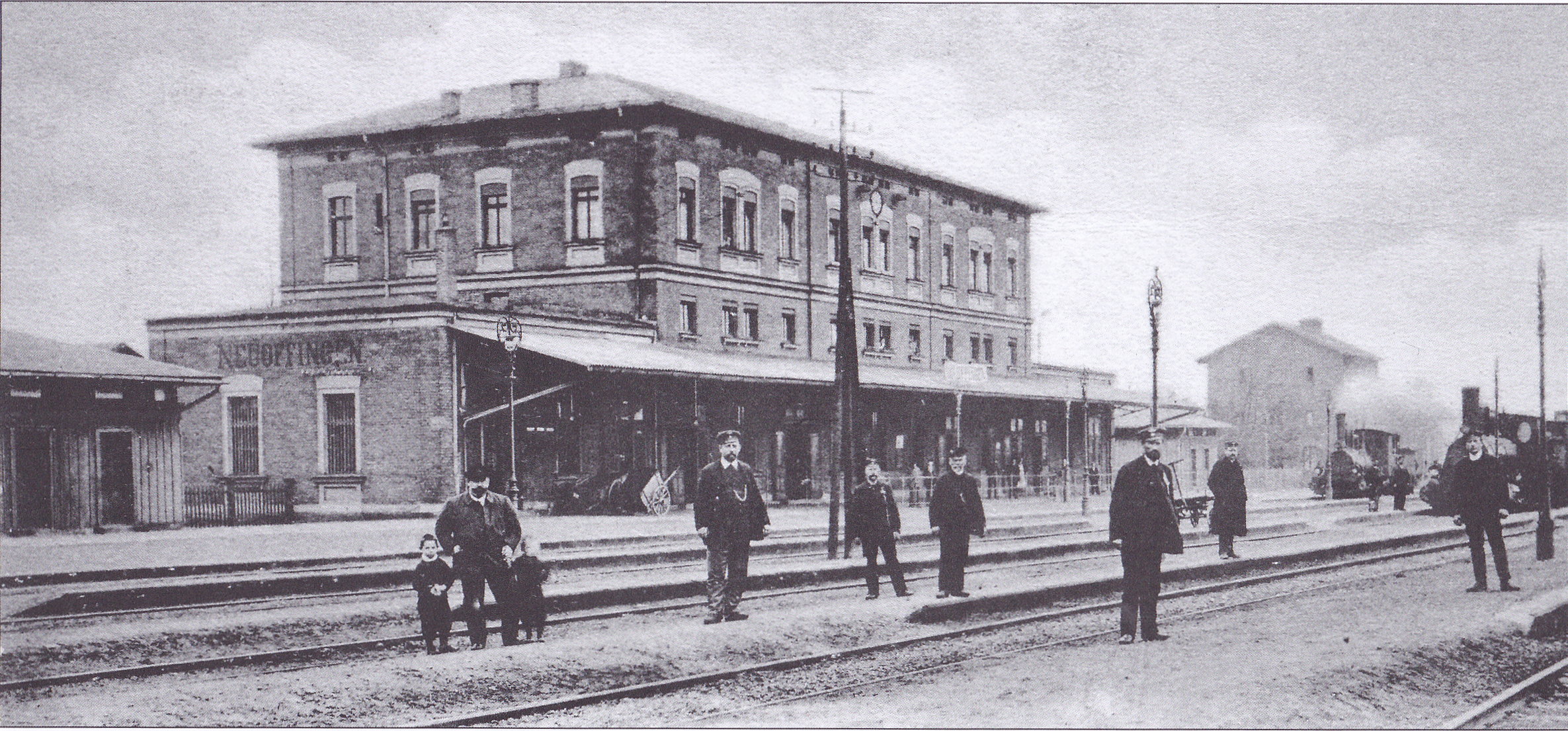 Empfangsgebäude des Bahnhofs Neuoffingen von der Gleisseite mit Bahnpersonal auf einer Postkarte, rechts im Hintergrund das Eisenbahnerwohnhaus